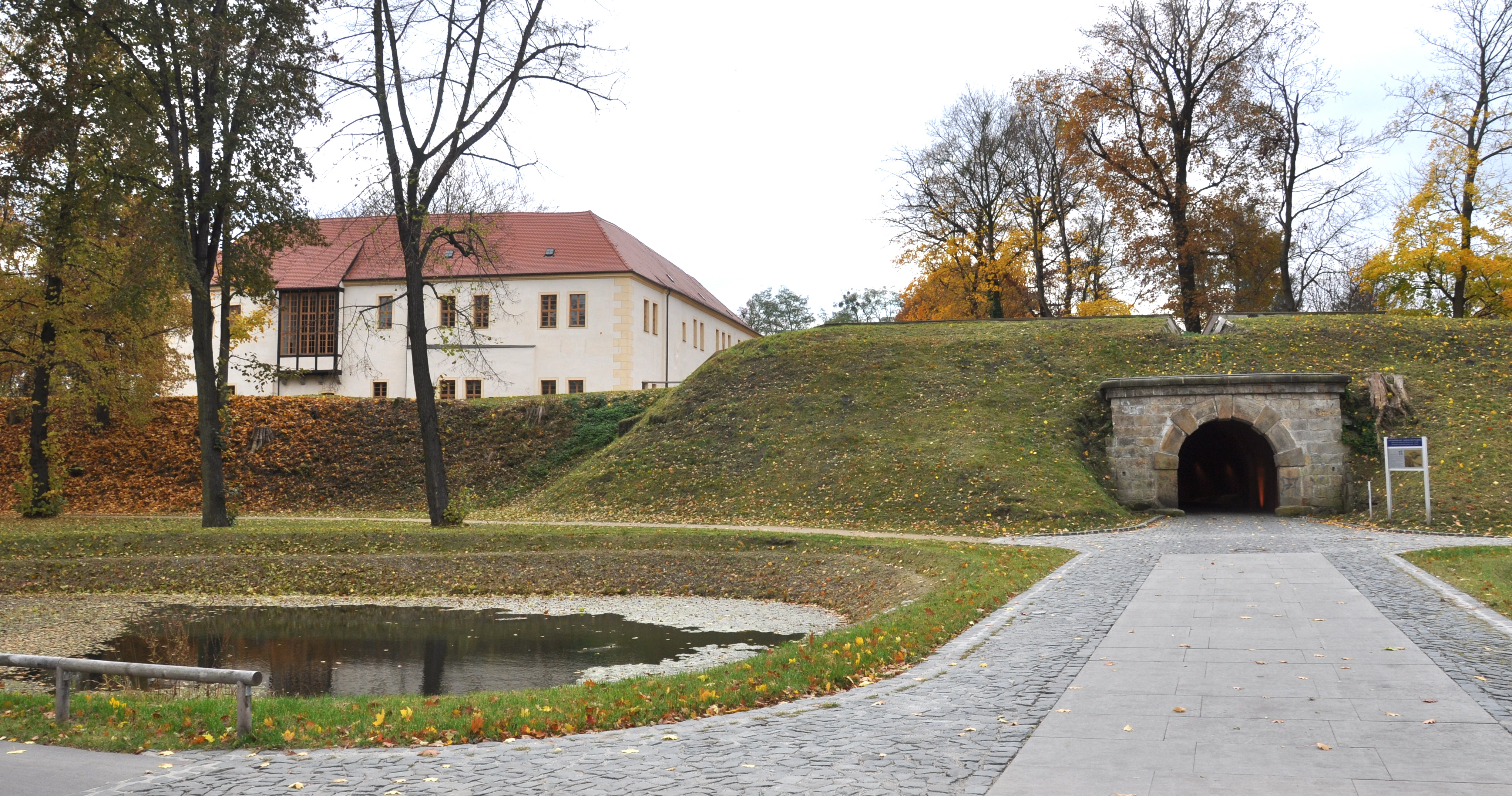 Senftenberg (Brandenburg), Schloss, Festungsanlagen von außen